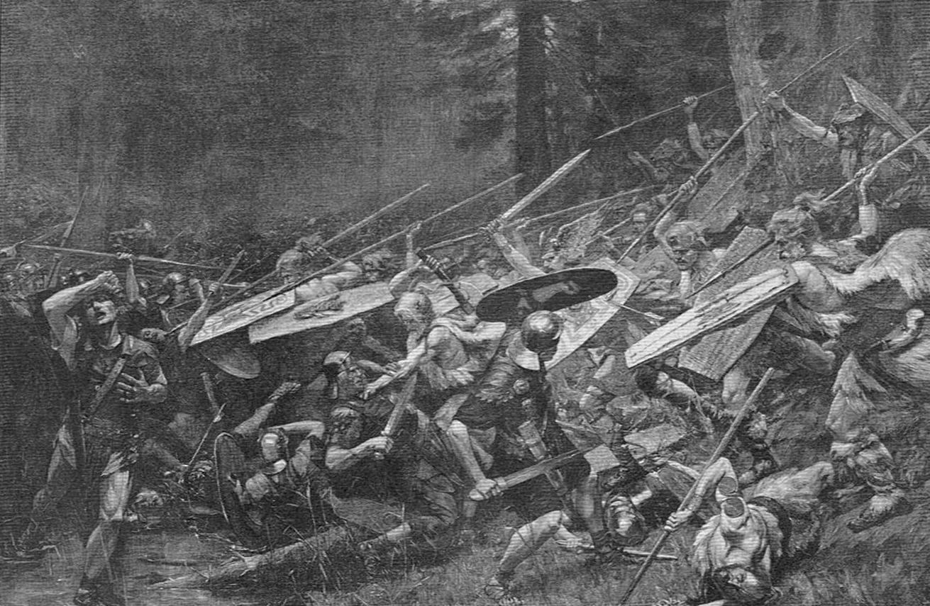 Битва при Аквах Секстиевых. Репродукция картины начала прошлого века.